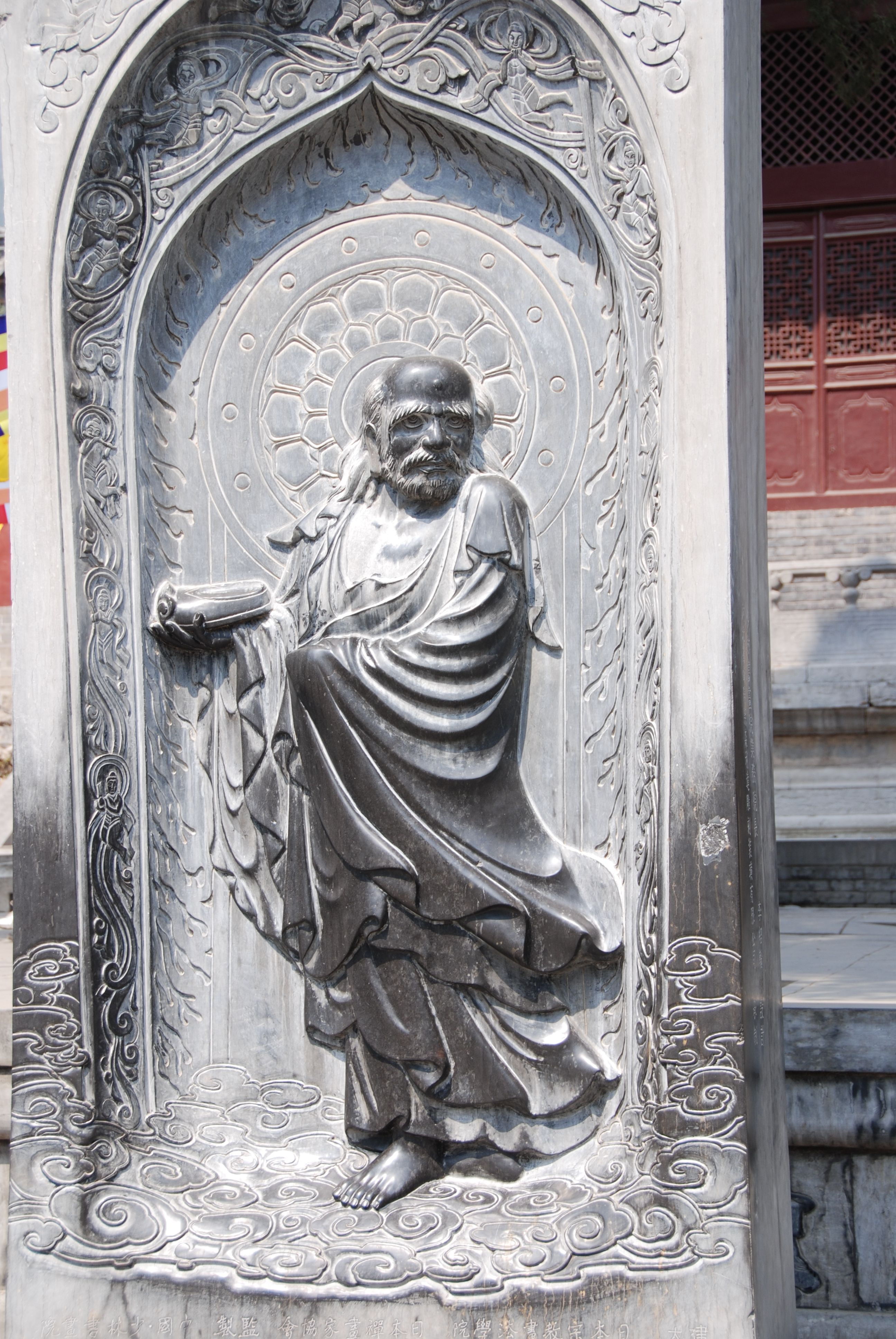 памятник Бодхидхарме в монастыре Суншань Шаолинь сы